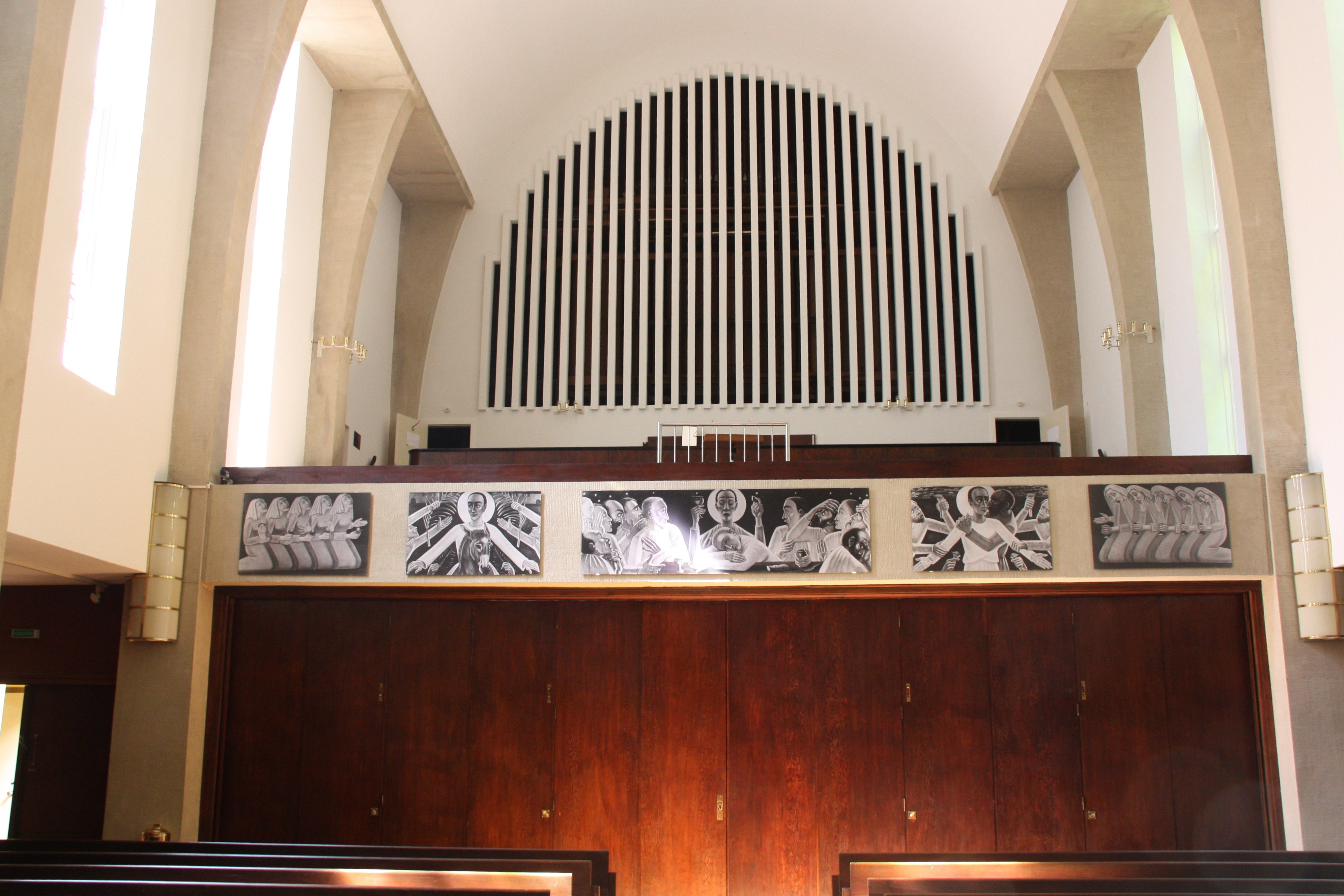 Hamburg, Langenhorn, Ansgarkirche, Innenraum, Reproduktion des Altaraufsatzes von Anita Ree, Gesamt an der Empore. Im Hintergrund die Verkleidung der Orgel.